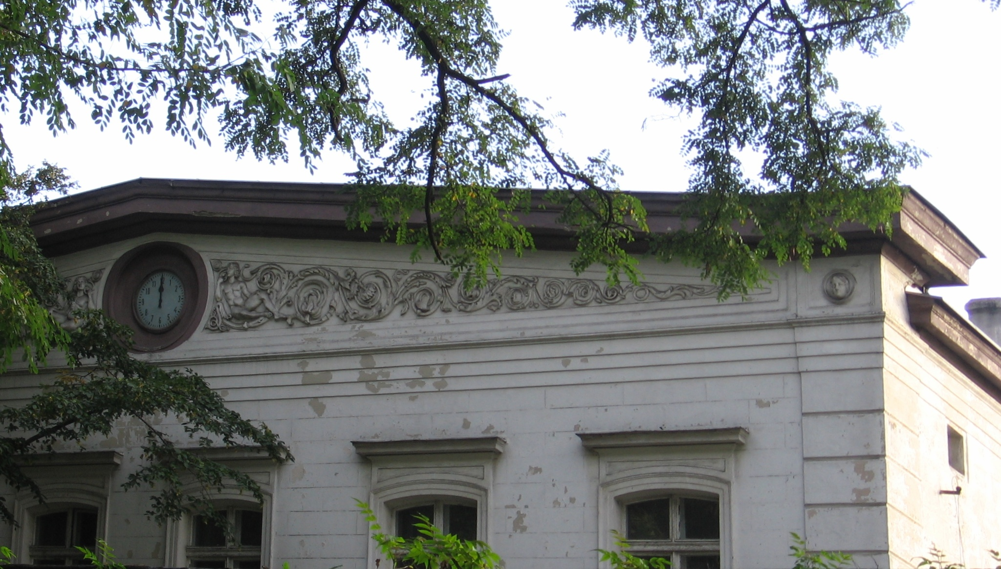 tympanon na budynku głównym Dworca Kolei Górnośląskiej (Oberschlesische Eisenbahn)